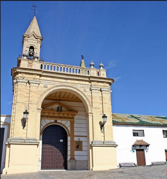 Las primeras referencias datan de 1590. La primitiva ermita, en un principio llamada de San Cristóbal, sufre diversas ampliaciones y reformas a lo largo de los siglos, especialmente en el siglo XIX.